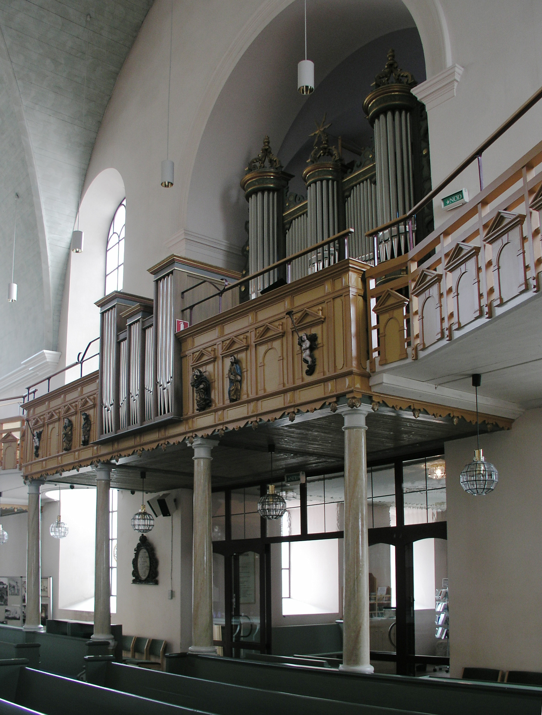 Gränna kyrka, Diocese of Växjö, Jönköping, Sweden. Church organ.